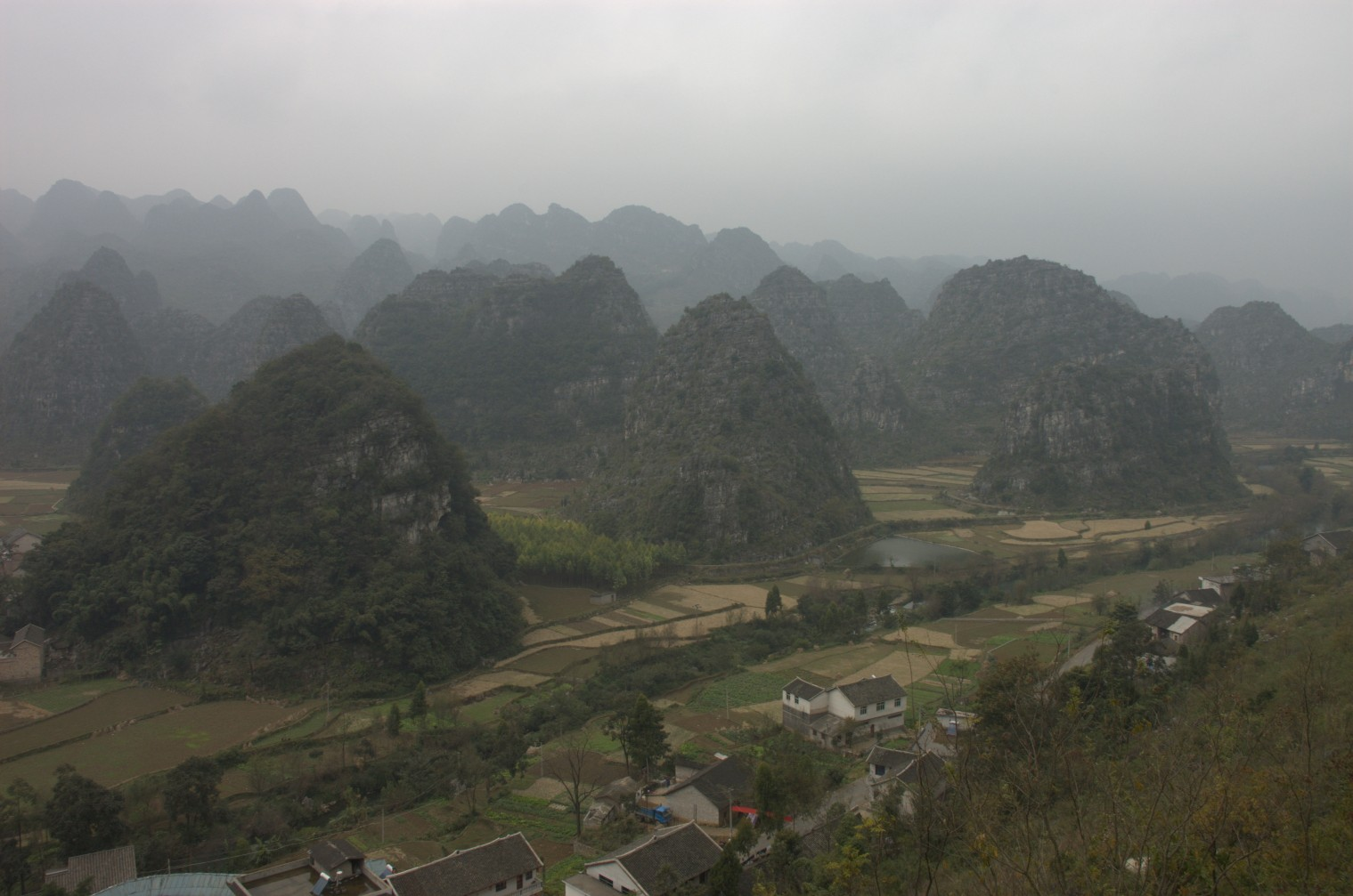 贵州 黔西南州 兴义万峰林